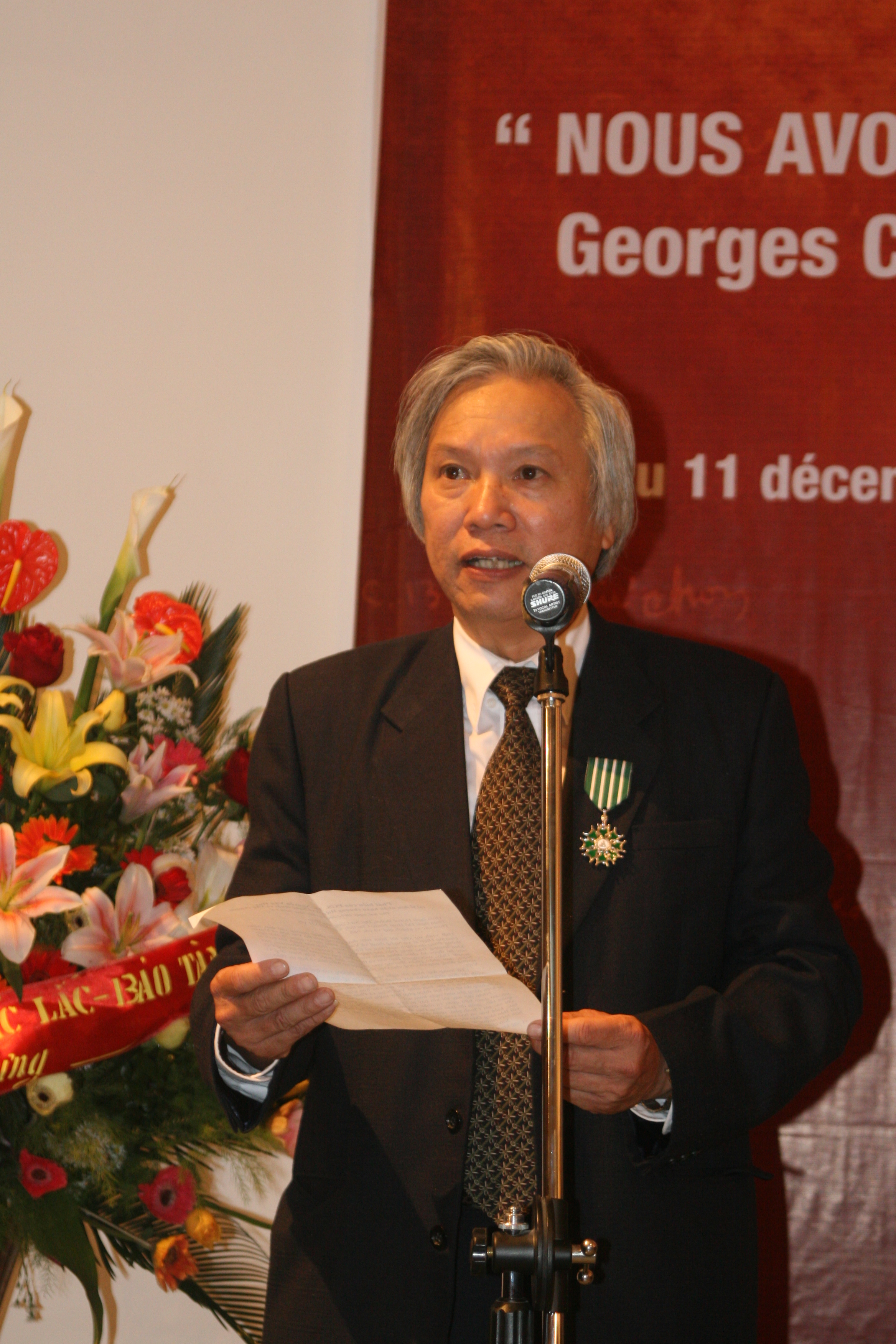 Nguyễn Văn Huy đọc bài diễn văn